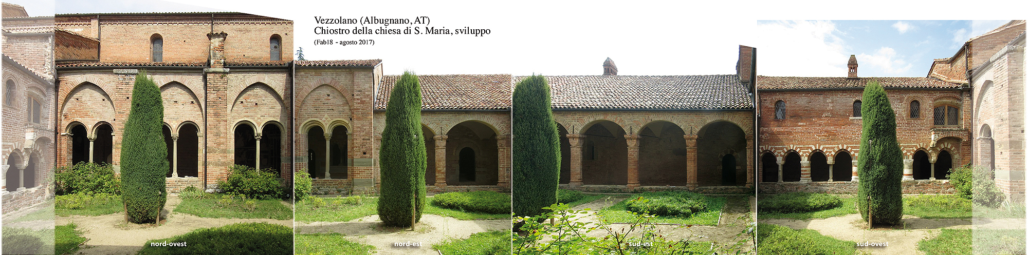 Vezzolano (Albugnano, prov. Asti). Chiostro medievale della cosiddetta Abbazia di S. Maria, sviluppo dei quattro lati.